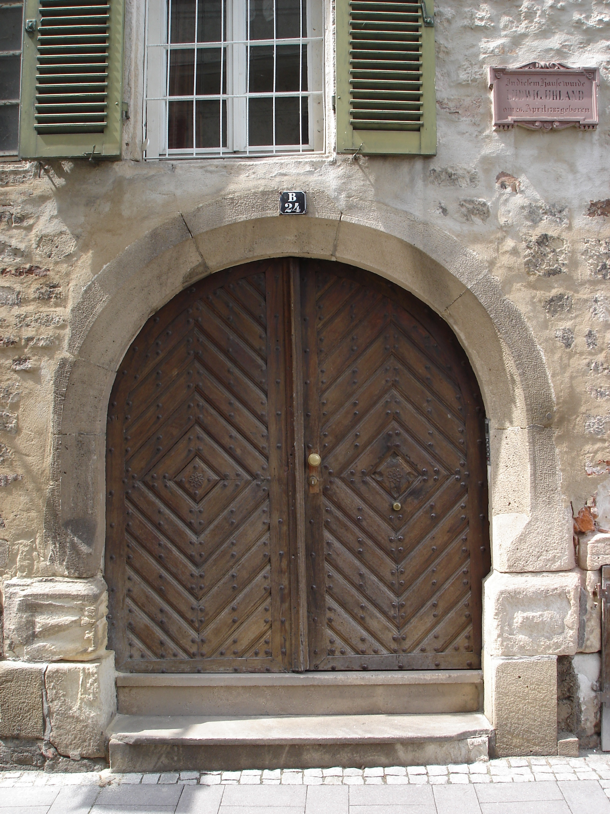 Eingang zu Ludwig Uhlands Geburtshaus in Tübingen mit Gedenktafel